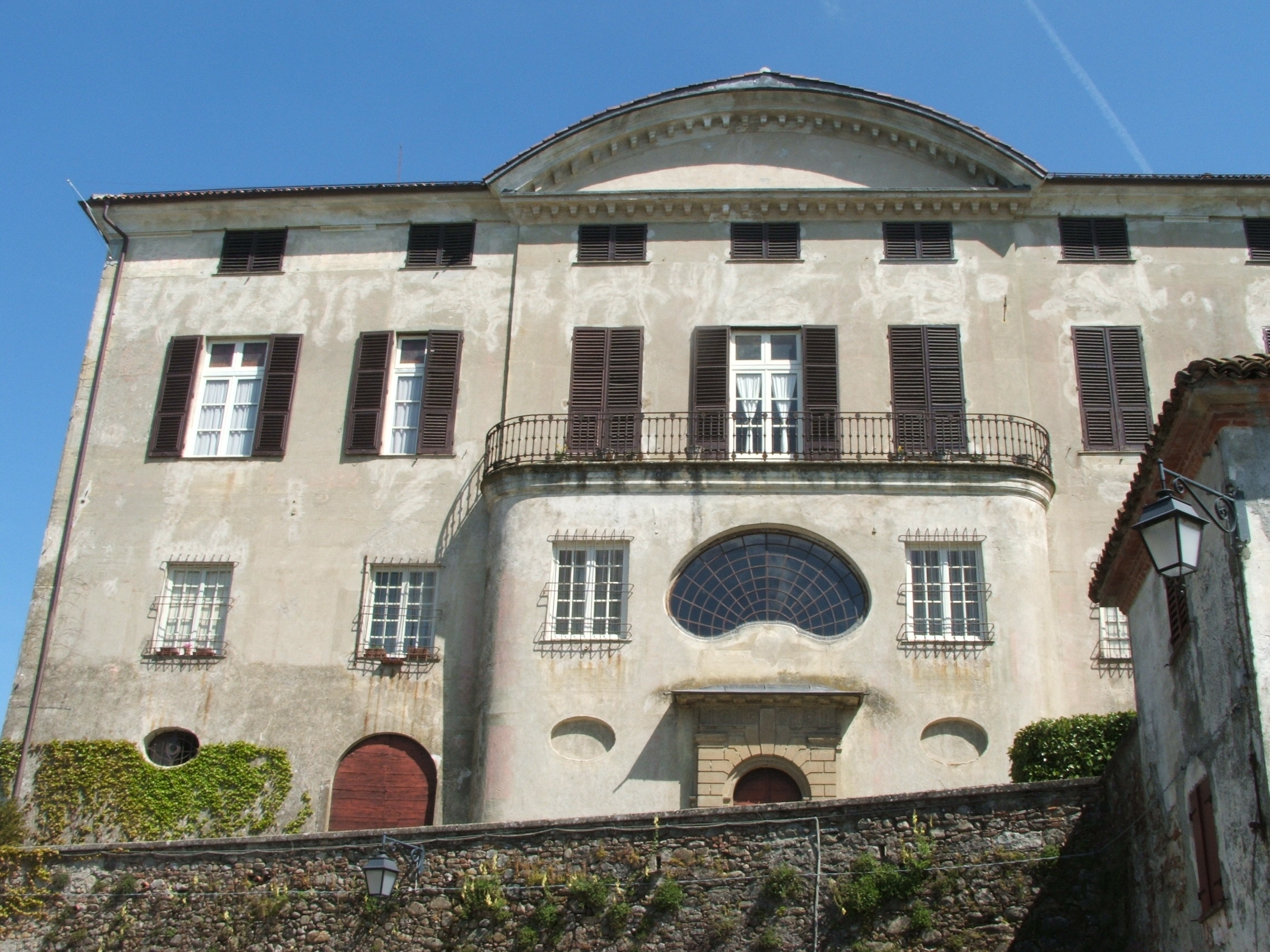 Il castello Malaspina-Grimaldi a Rocca Grimalda, Alessandria, Piemonte, Italia